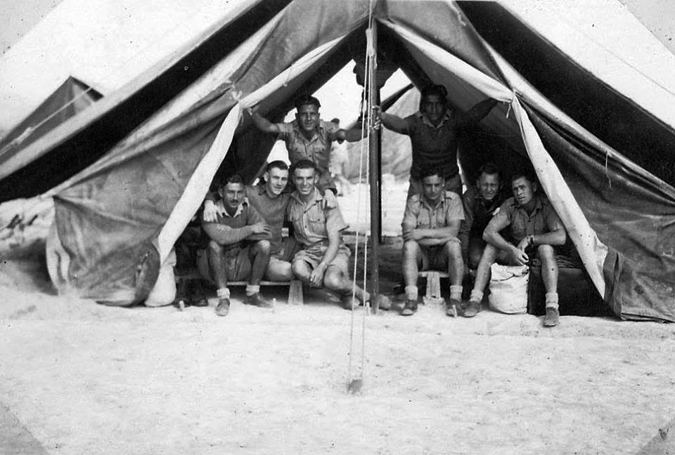 באוהל בצבא הבריטי